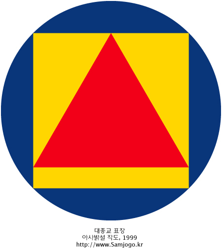 대종교 표장입니다. 편집가능한 벡터이미지는 이용하세요.